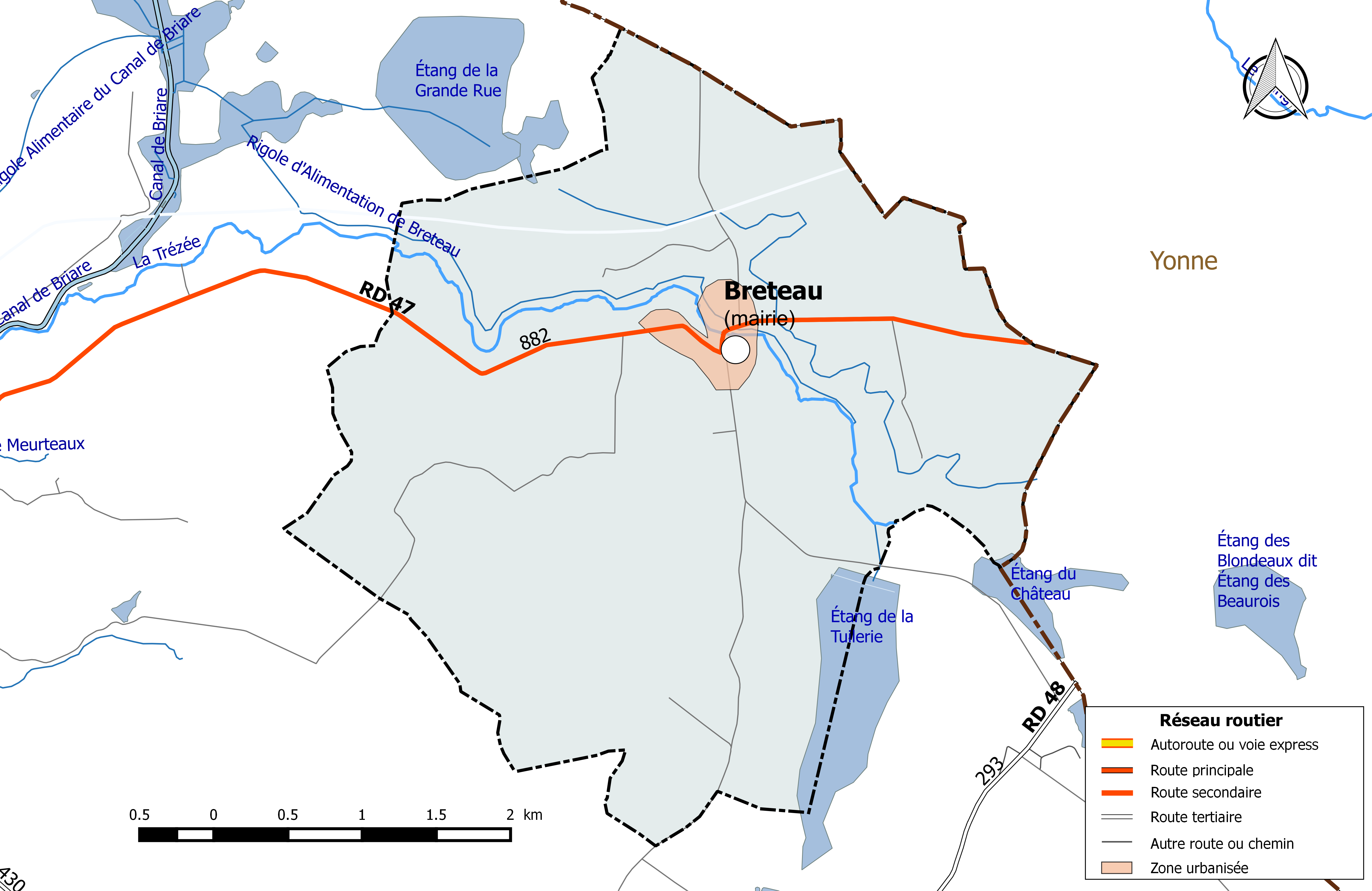 Carte du réseau routier de la commune de Breteau.